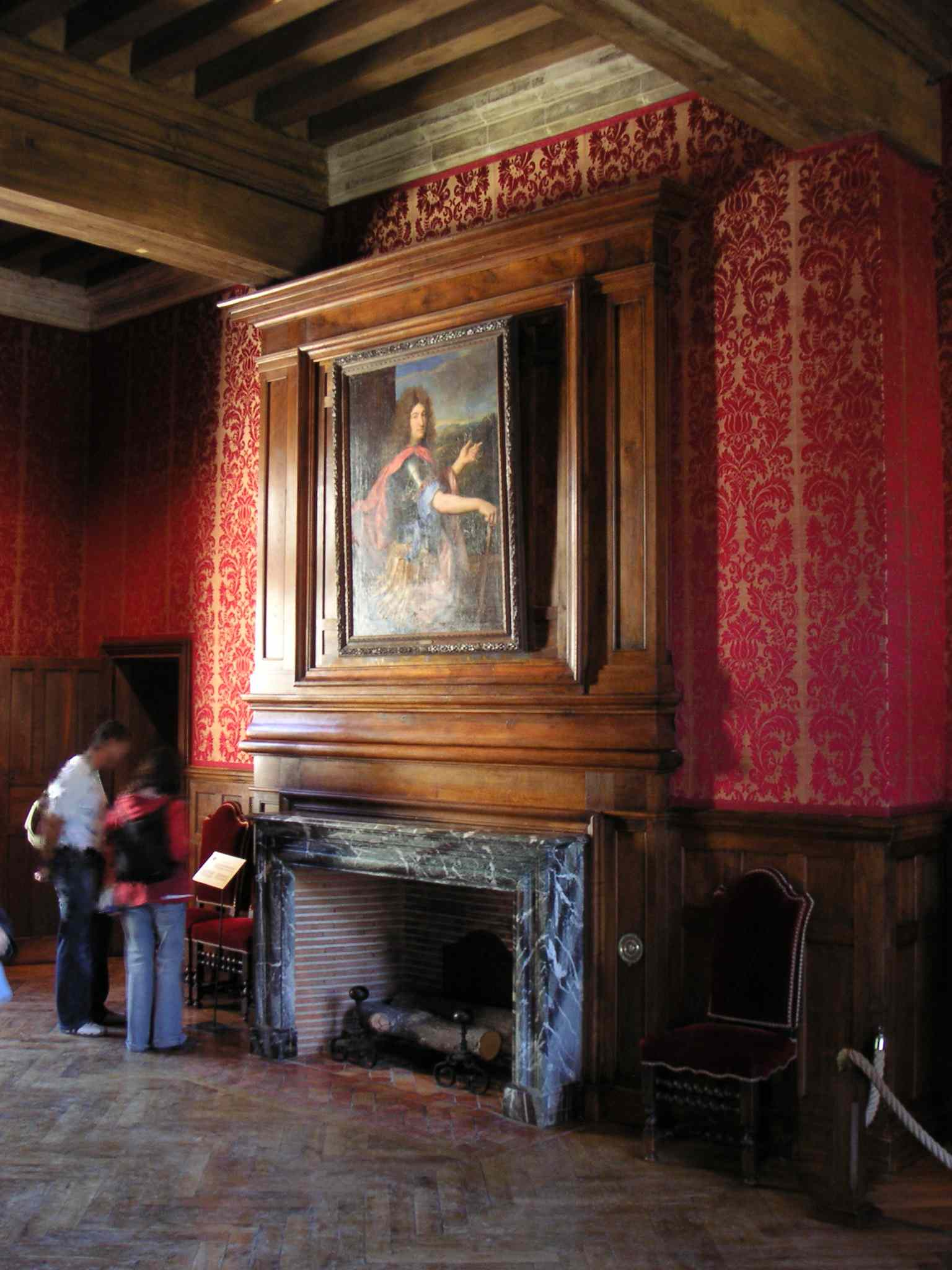 Vue de la chambre premier étage du château d'Azay-le-rideau (France) Il s'agit de l'anti-chambre